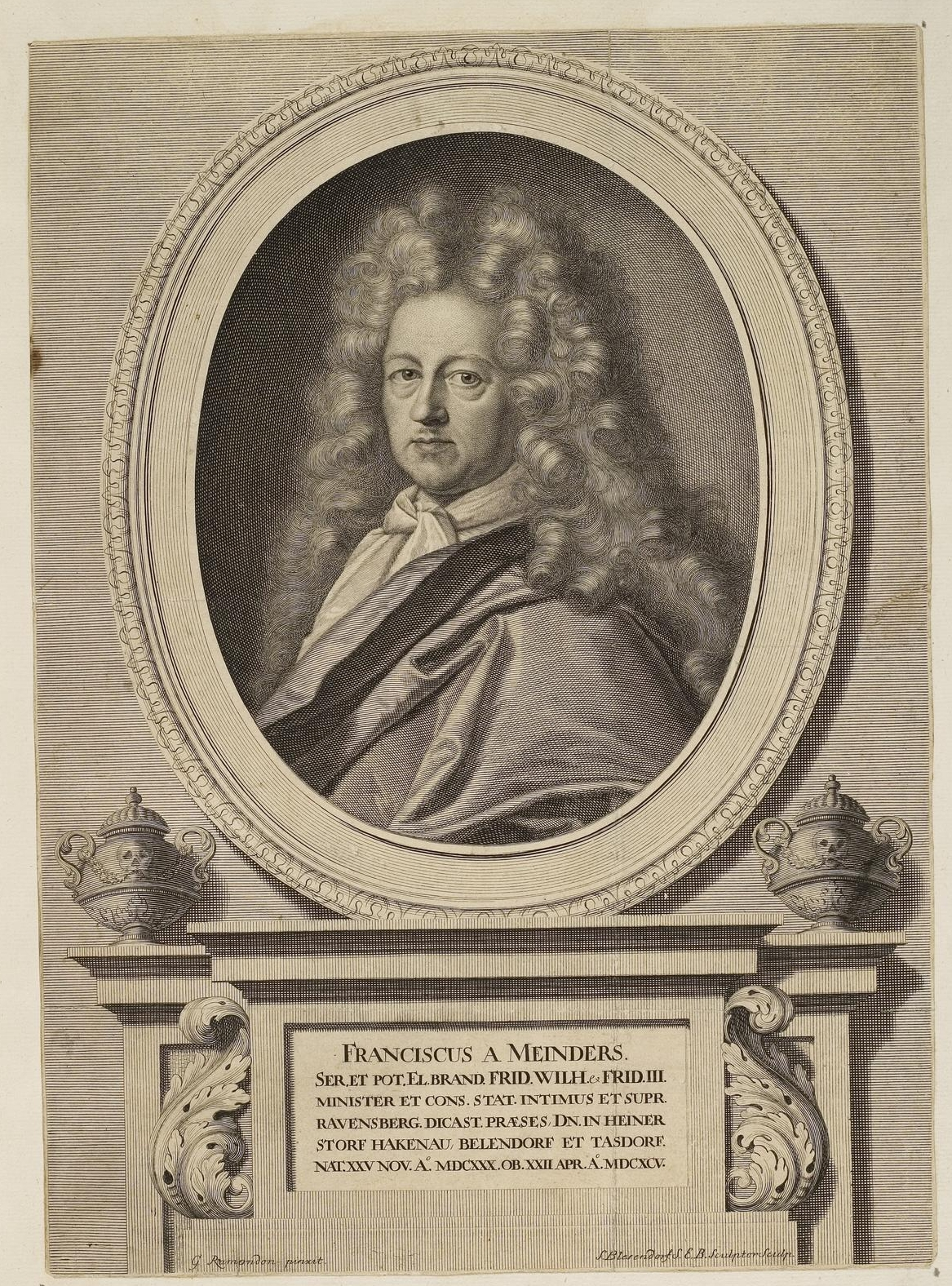 Grafik aus dem Klebeband Nr. 1 der Fürstlich Waldeckschen Hofbibliothek Arolsen Motiv: Franz von Meinders, kurbrandenburger Minister und Diplomat unter Friedrich Wilhelm und Friedrich III.